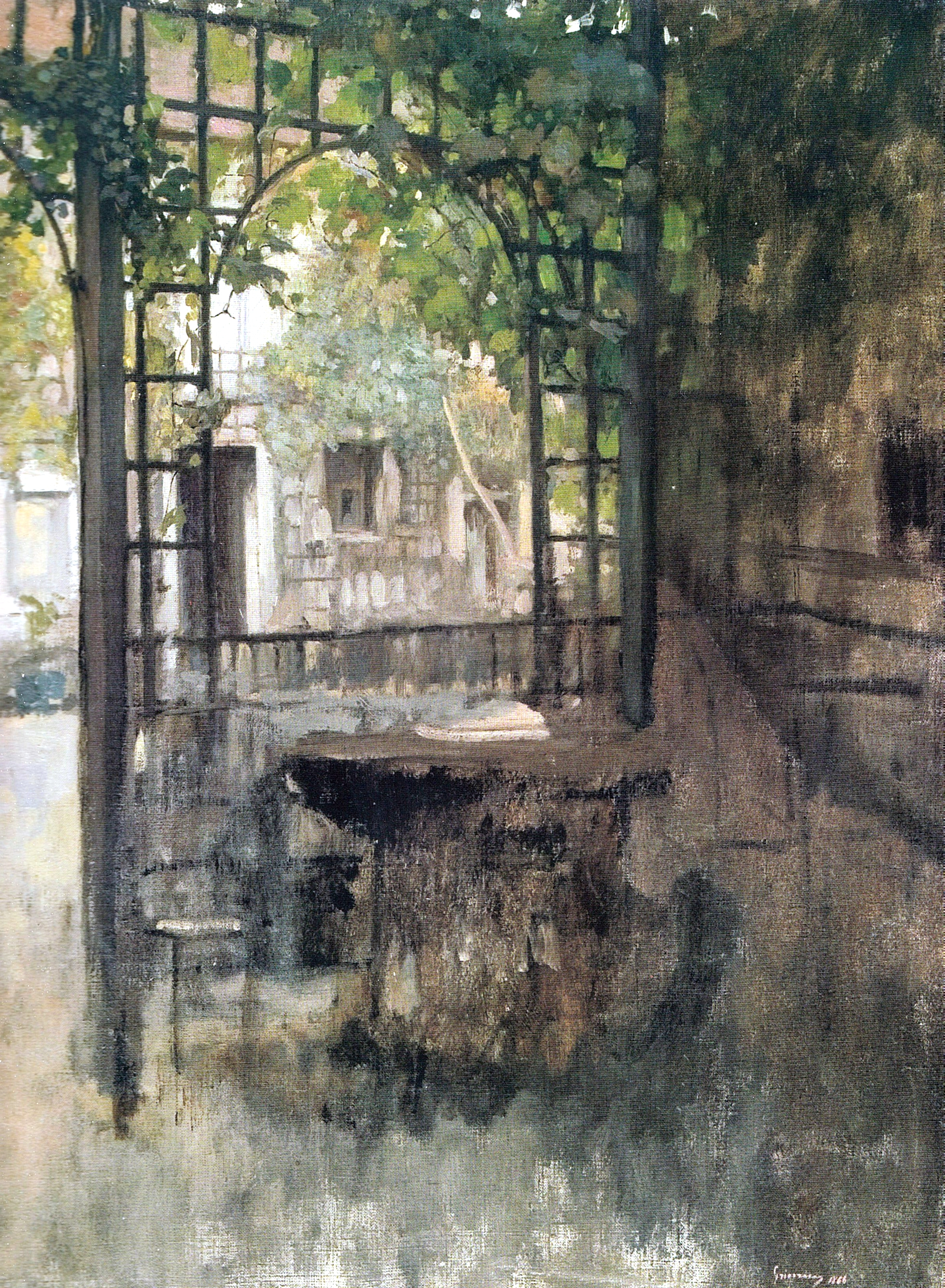 Peisaj intitulat Interior de curte la Barbizon - Galeria de Artă Românească Modernă de la Muzeul Național de Artă al României.